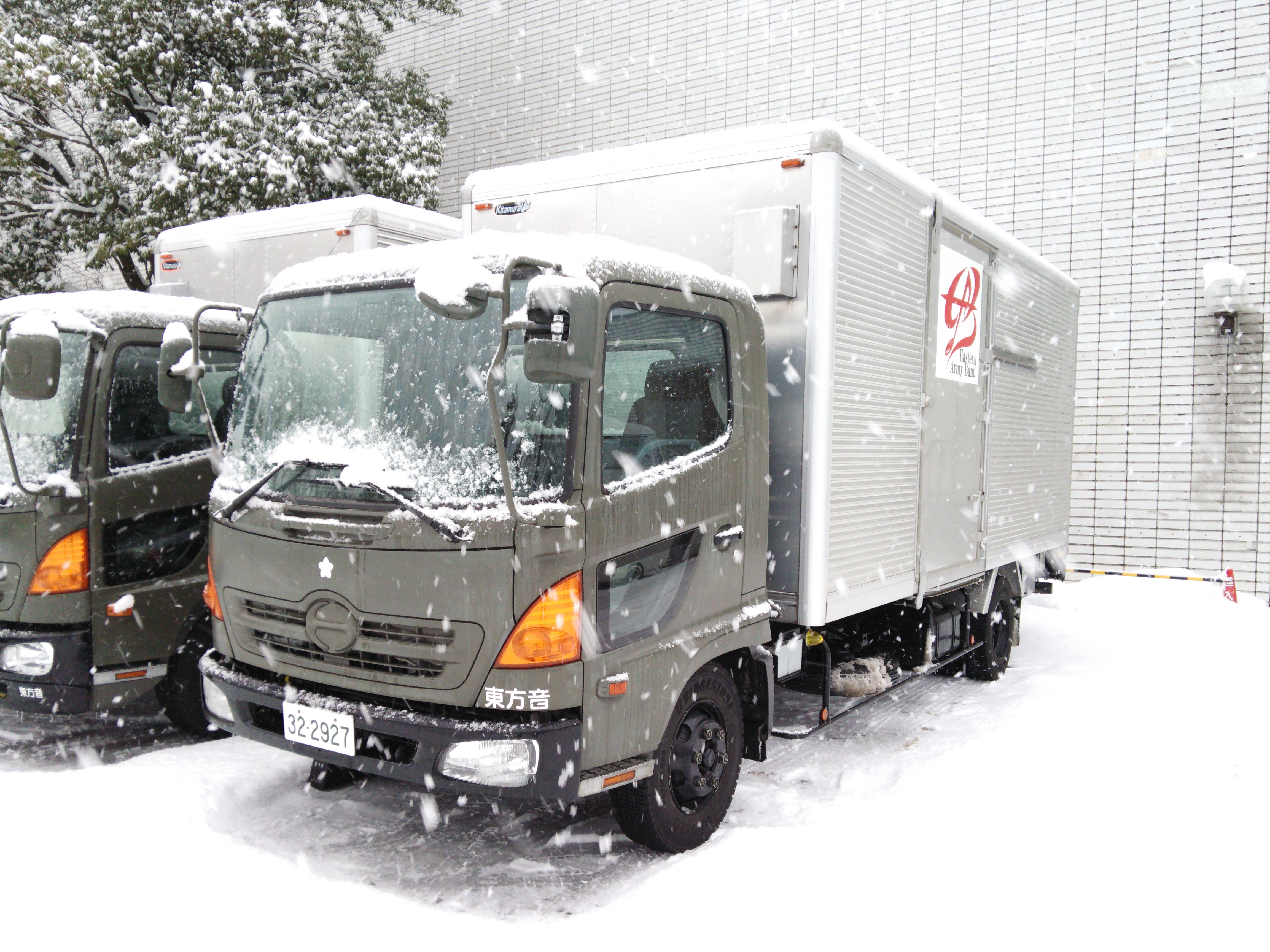 陸上自衛隊東部方面音楽隊の楽器輸送用業務トラック